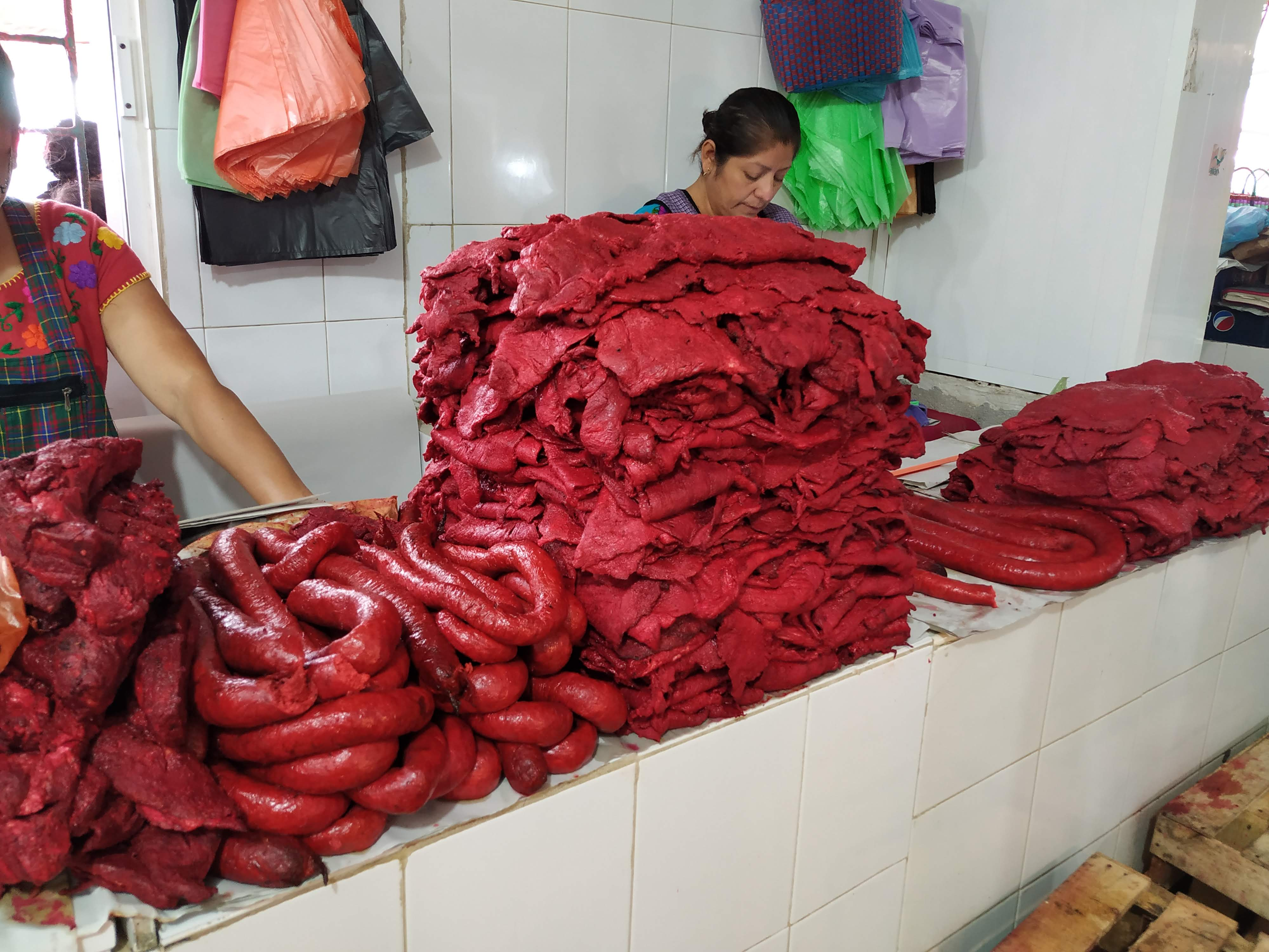 Carne de chinameca y longaniza apiladas en un puesto del Mercado Morelos en Coatzacoalcos, Veracruz.